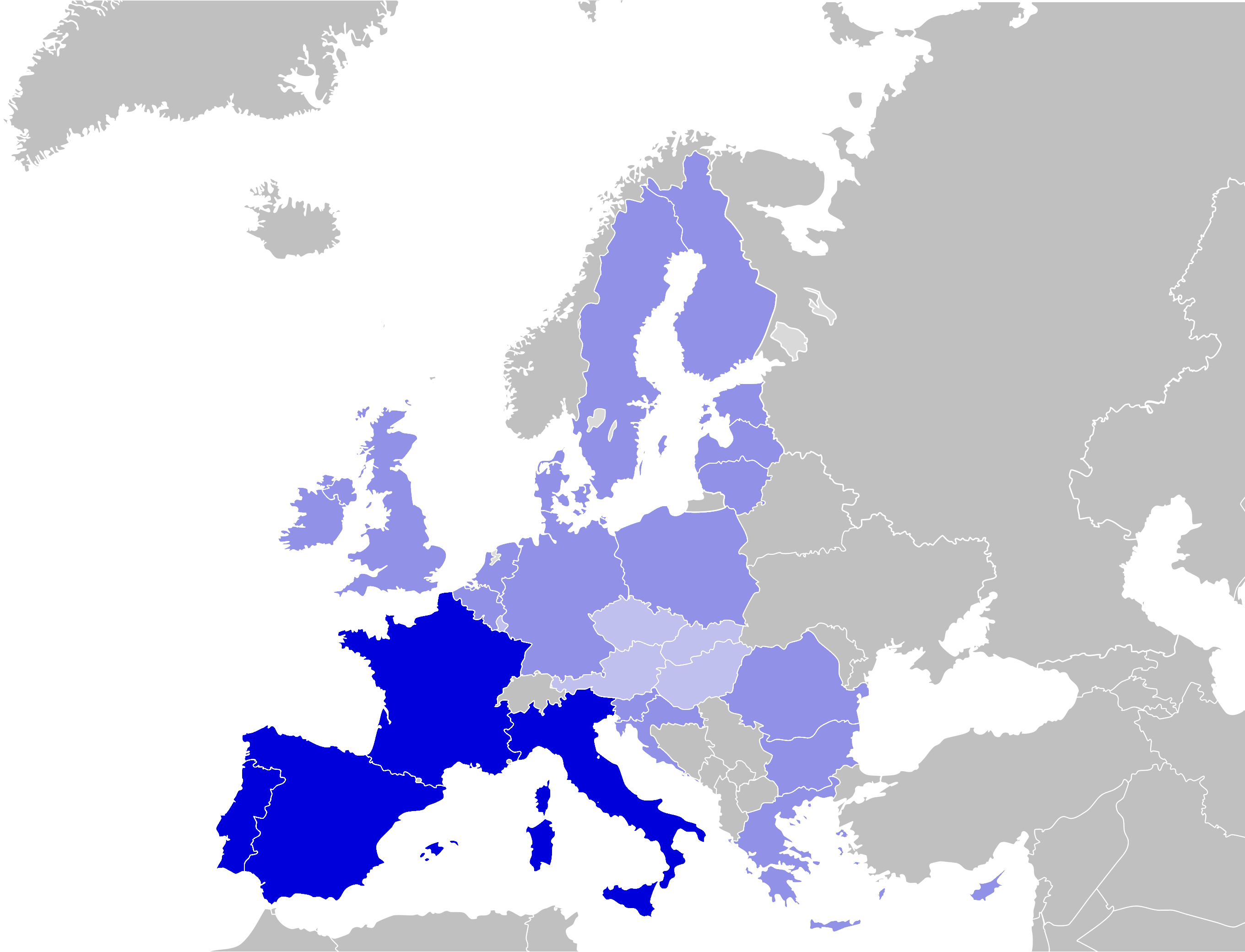 Mitgliedsstaaten der European Maritime Force erstellt auf Basis der Wikipedia-blank-Europakarte Legende: Blau: Mitglieder Mittelblau: Mitglieder der Europäischen Union mit Marine Hellblau: Mitglieder der Europäischen Union ohne Marine